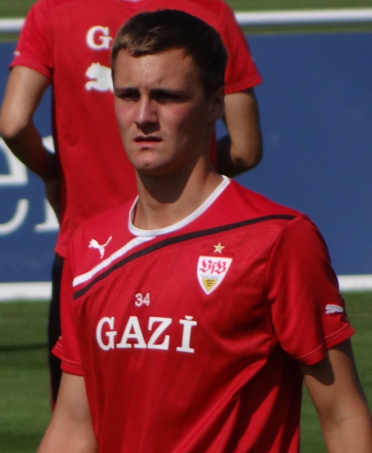 aufgenommen beim VfB-Training von